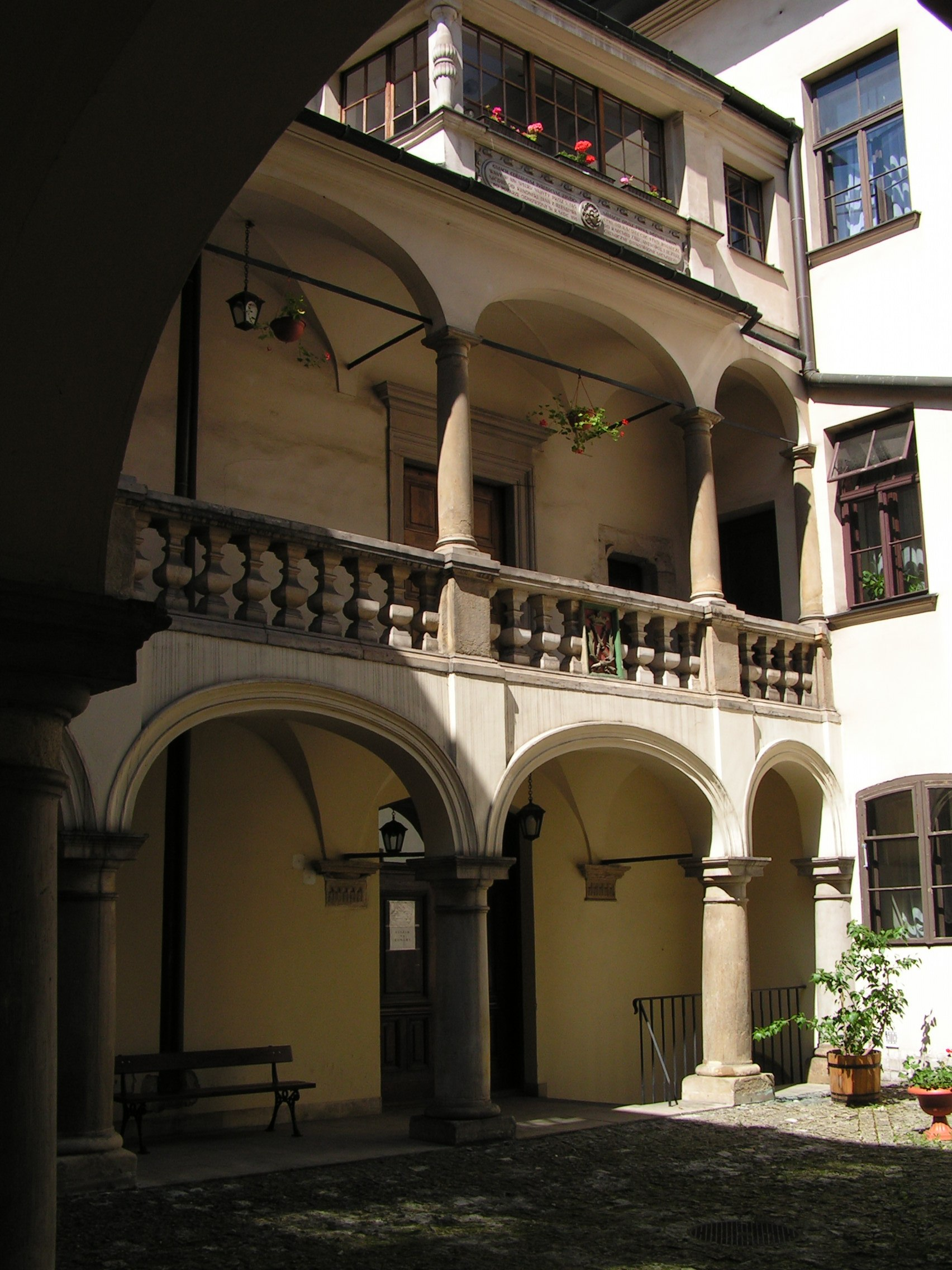 Collegium Iuridicum, Kraków